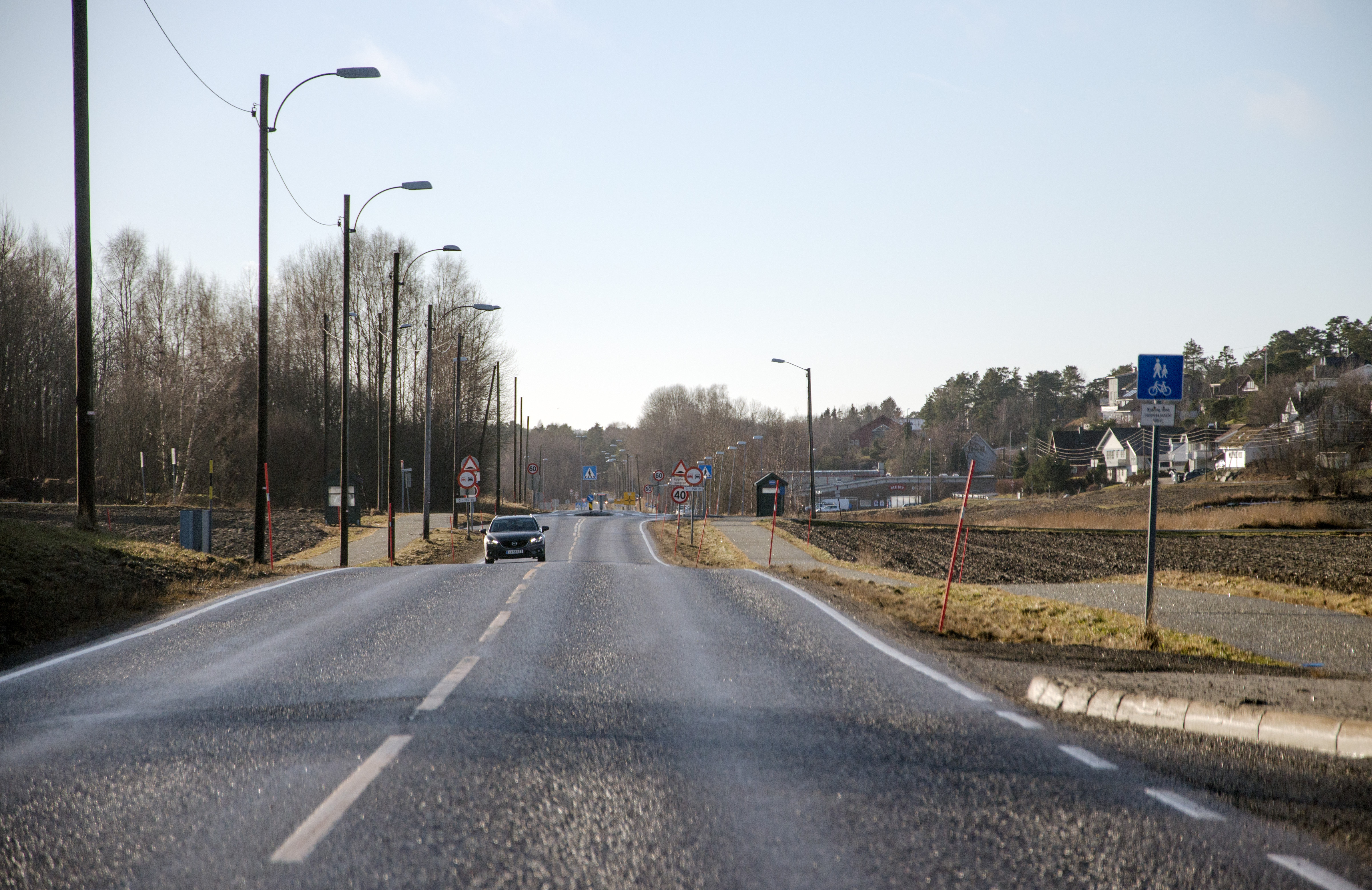 Fylkesvei 303 ved Lofterød i Sandefjord